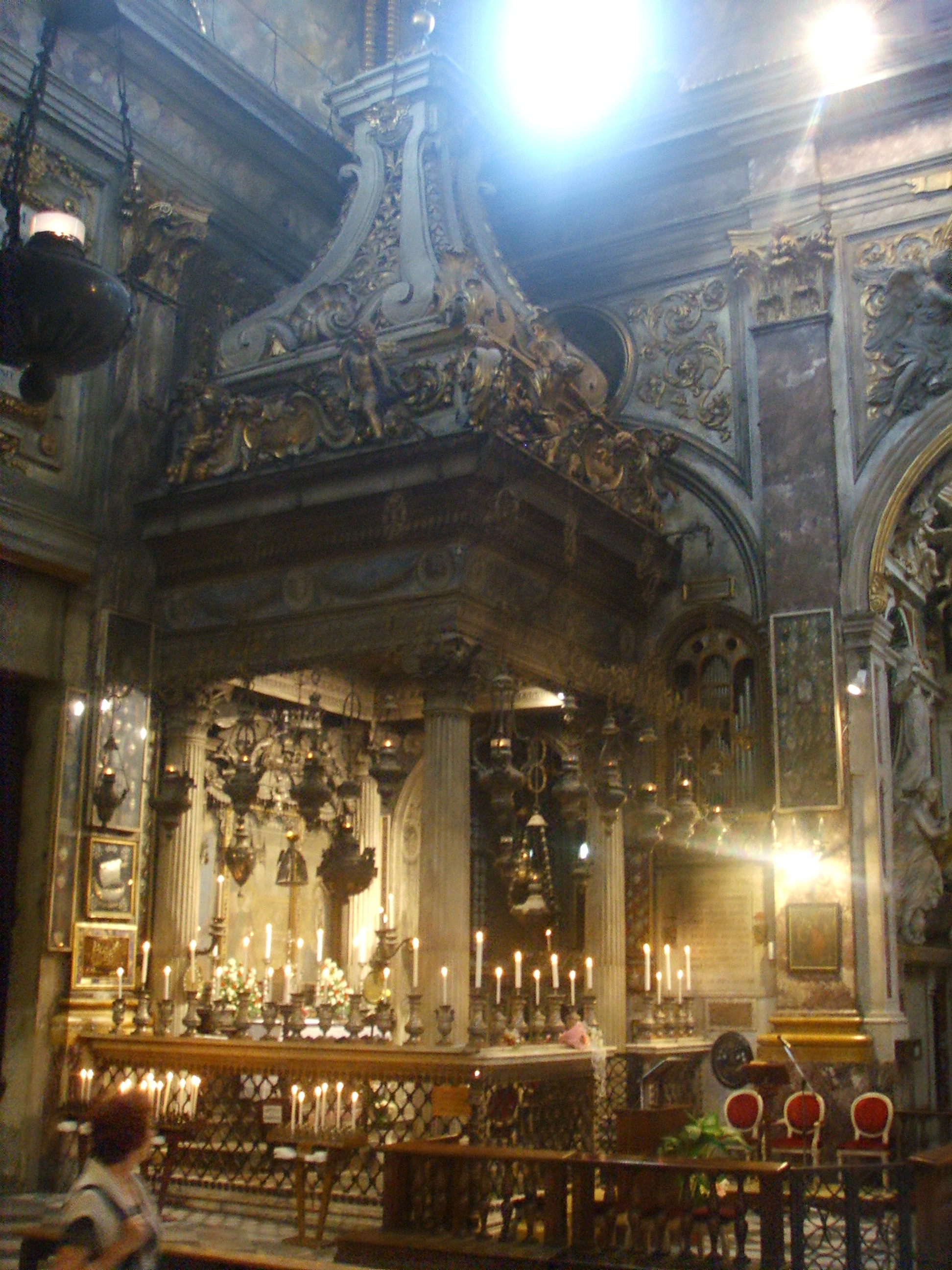 Santissima annunziata inside in Florence, italy